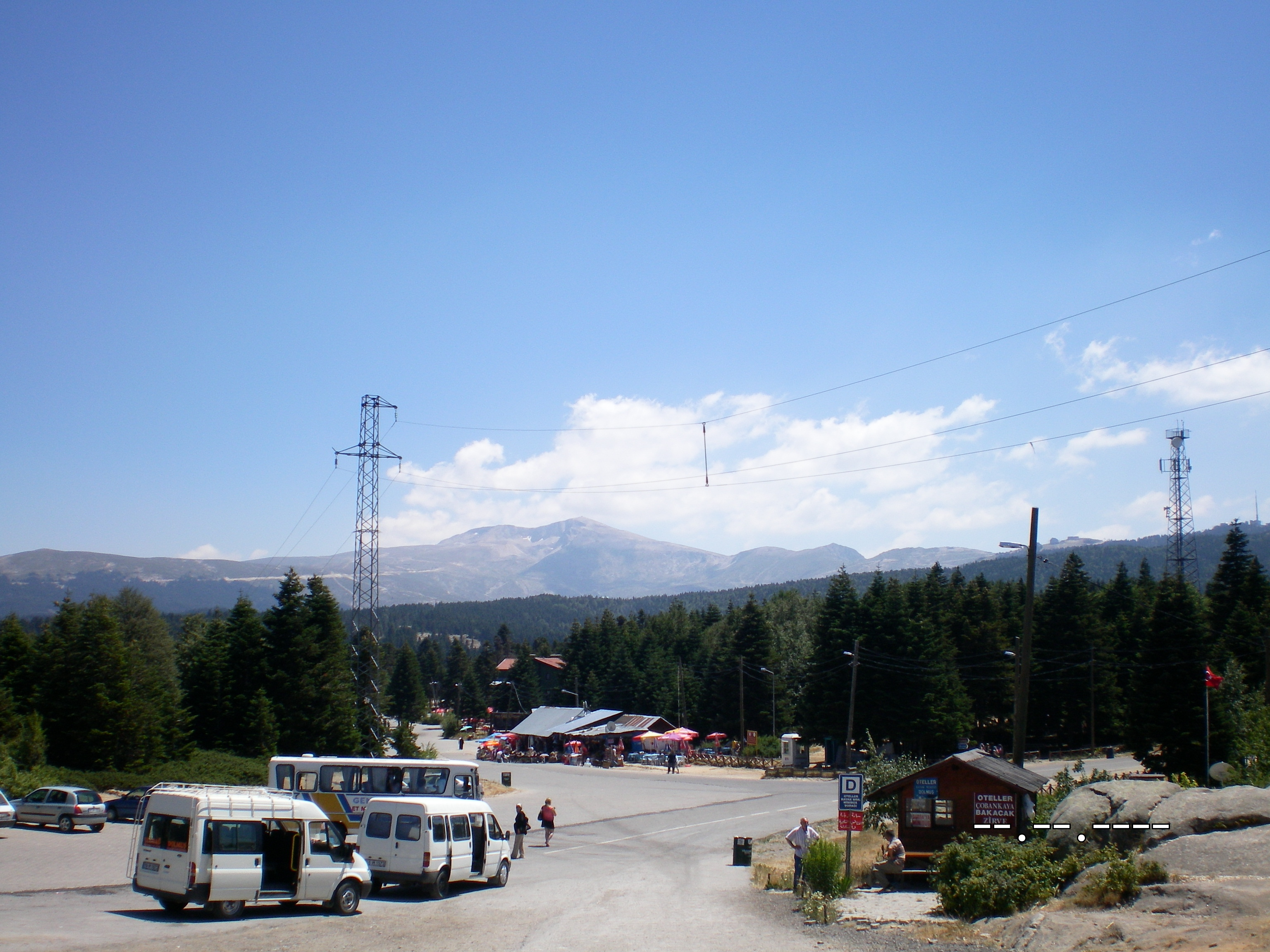 Sarıalan'dan bir görüntü.